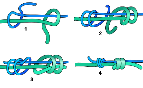 preparazione del nodo doppio inglese